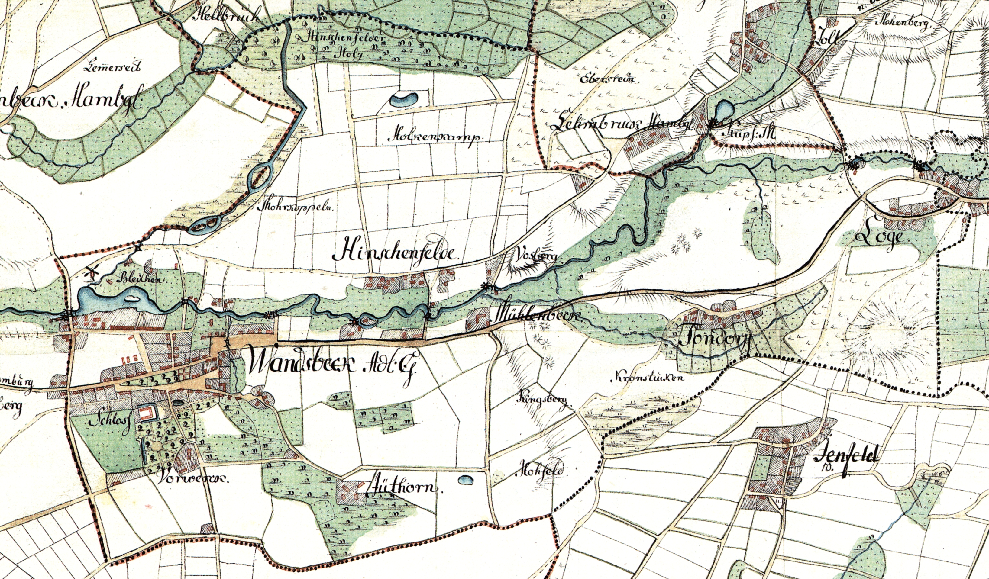 Ausschnitt Wandsbeck aus Image:Varendorf(63)Bergedorf Reinbek.jpg. Aufgenommen in den Jahren 1789 bis 1796 unter der Direktion des Majors Gustav Adolf von Varendorf durch Offiziere des Schleswigschen Infanterieregiments